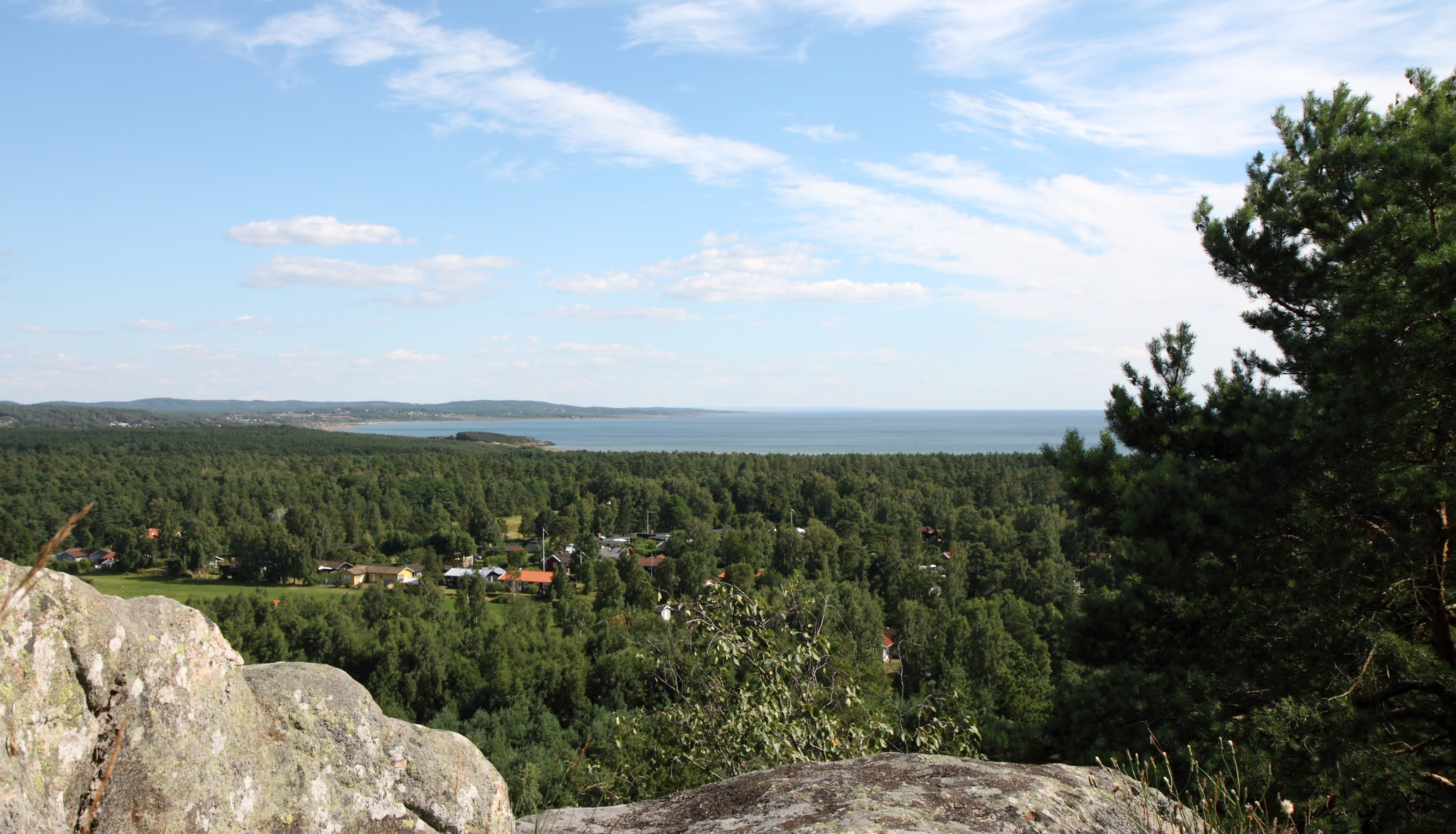 Utsikt från Smörkullens topp i naturreservatet Smörkullen.